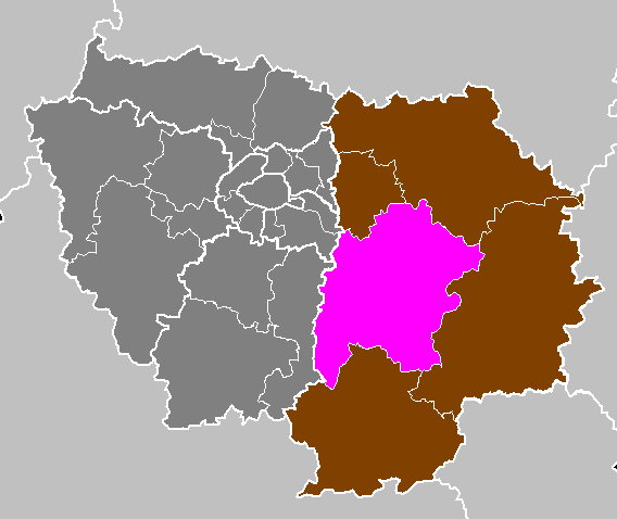 Maps of arrondissements and cantons of France: Département de Seine-et-Marne - Arrondissement de Melun.PNG (Région Île-de-France)